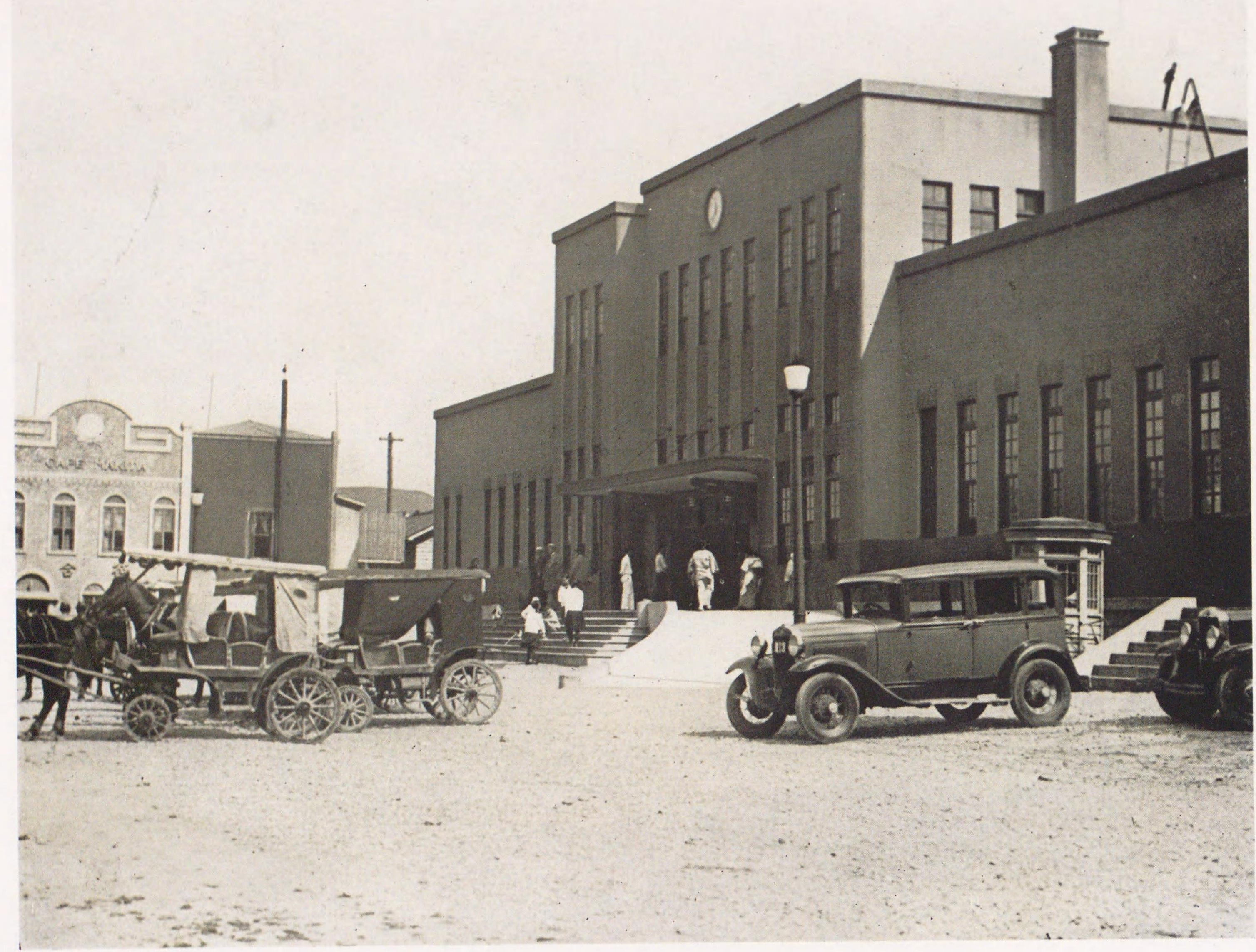 樺太西線所属真岡駅駅舎。